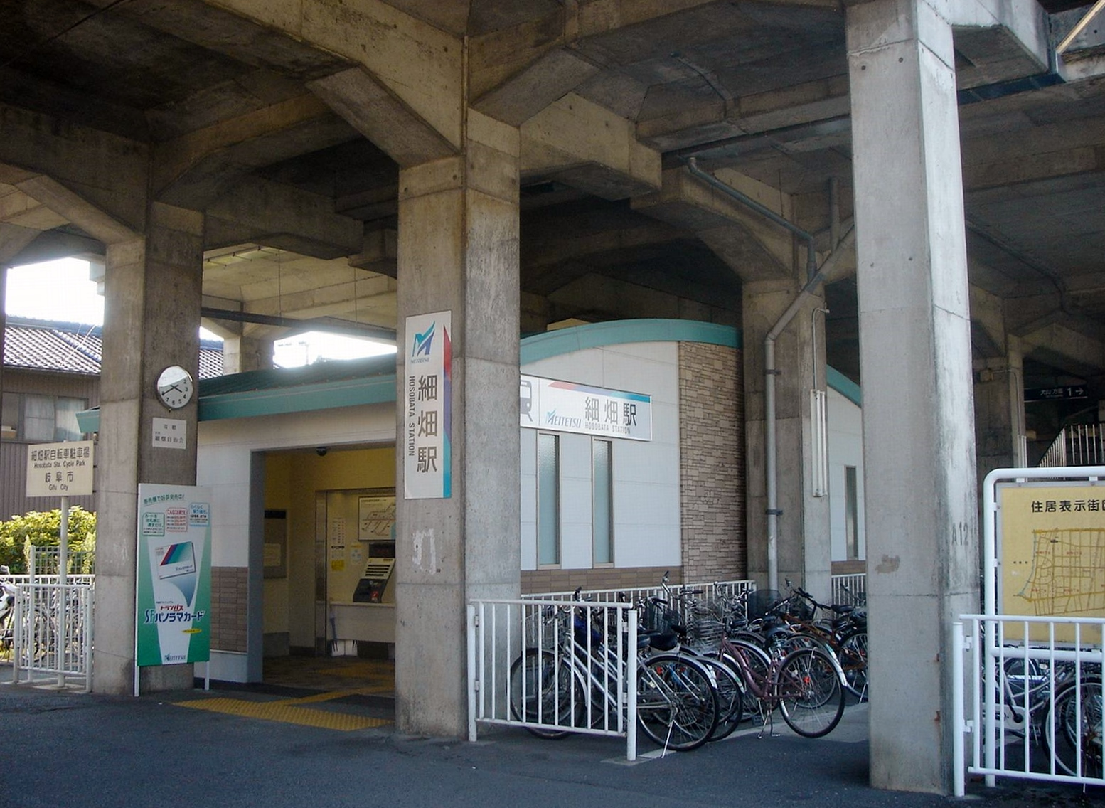 Hosobata Station（細畑駅）,Gifu,Gifu,Japan(岐阜県岐阜市)で撮影。